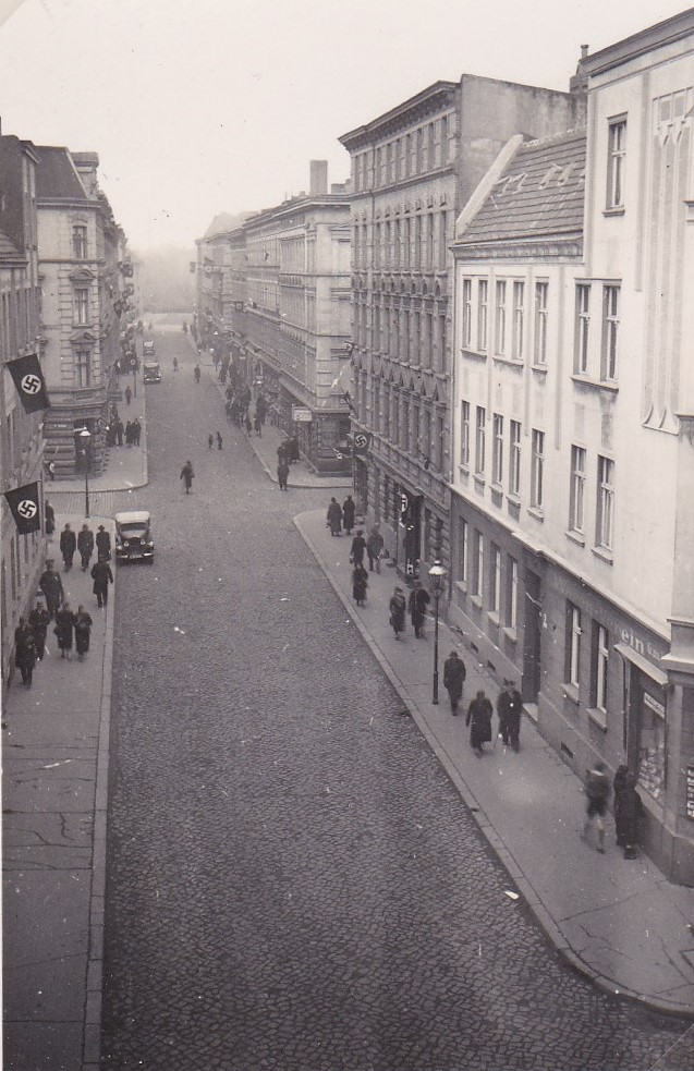 Blick aus dem Haus Sudenburger Straße 23, (1. Eingang, 3. Etage, Wohnung der Witwe Anna Schön, Zimmer des Untermieters Heinz Meister) in Magdeburg nach Westen auf die Sudenburger Straße in Richtung Dodendorfer Straße, wohl 1938, (zumindest jedoch zwischen 1.5.1937 und 1.8.1940)